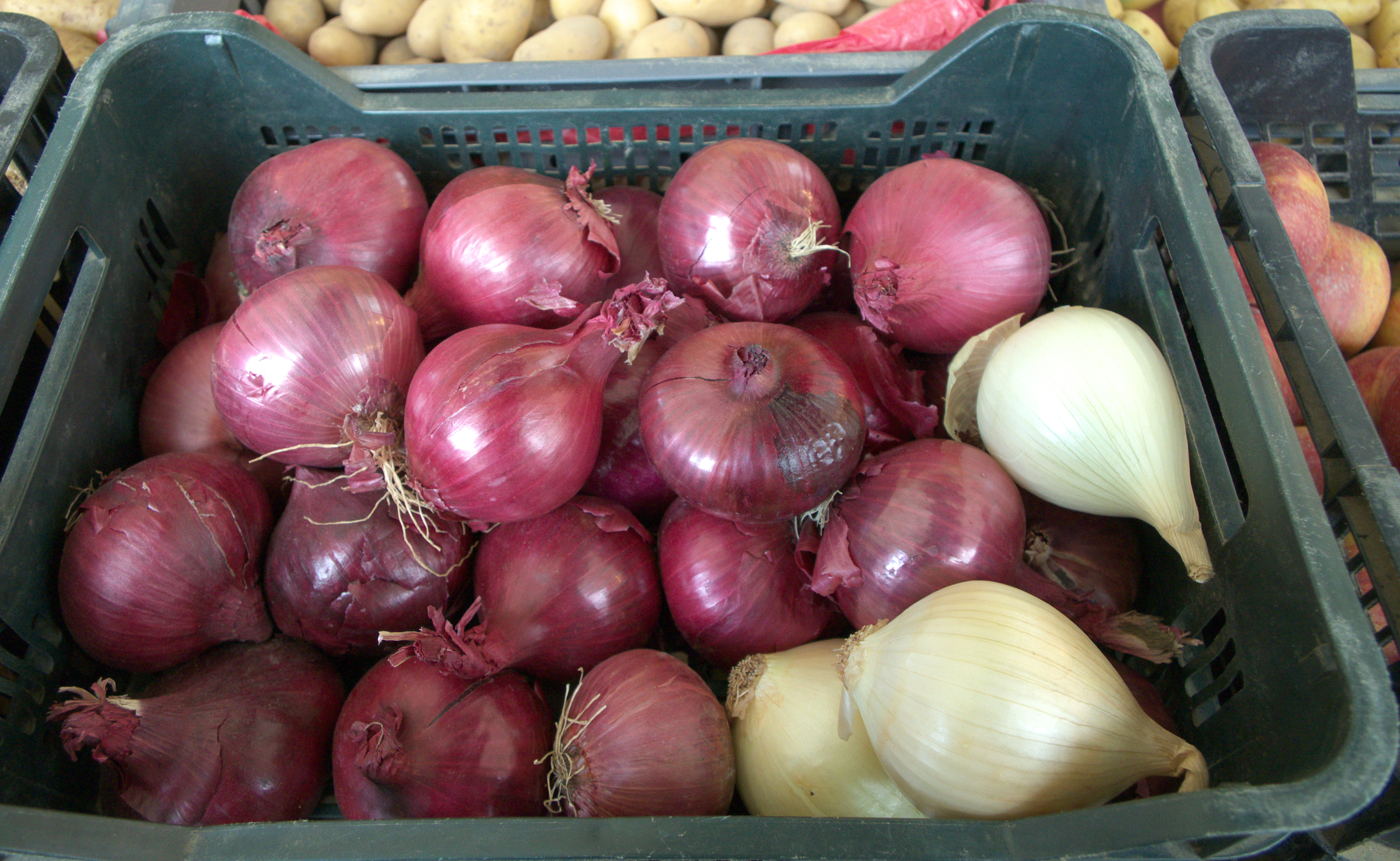 Oignons rouges au marché